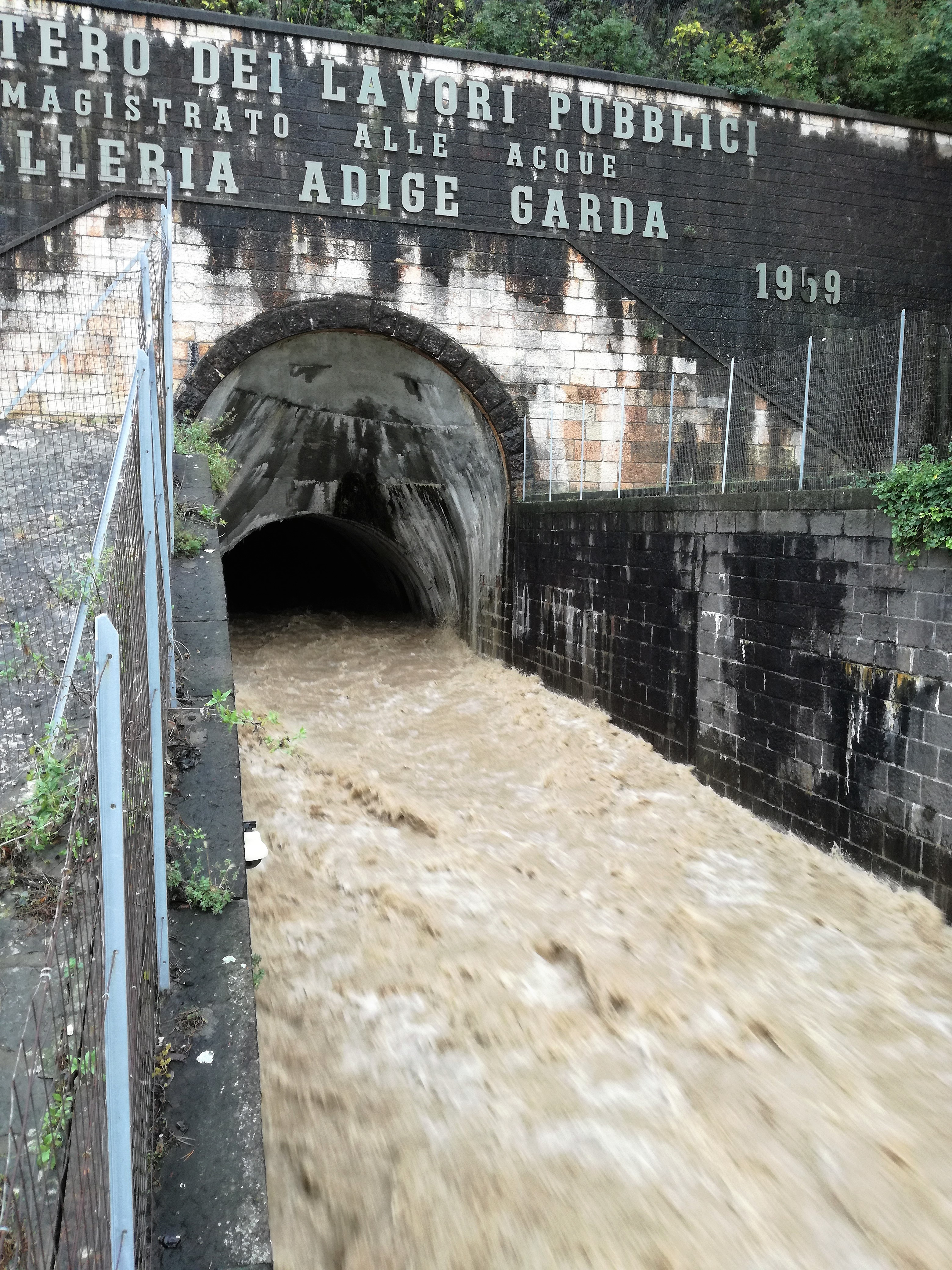 Etsch - Gardaseetunnel Hochwasser vom 30. Oktober 2018